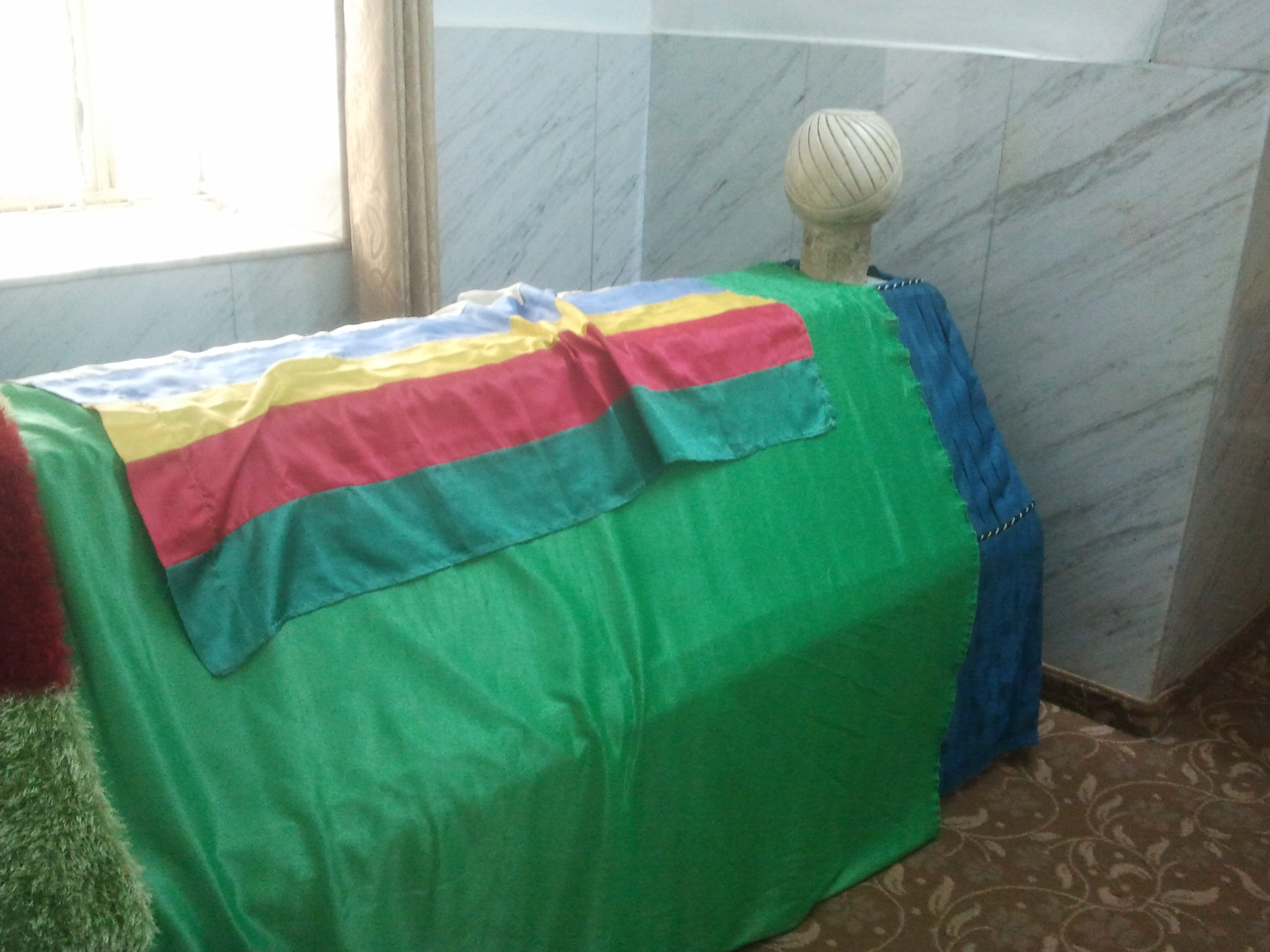 קבר נבי יהודה, או נבי הודה, הוא מבנה המזוהה על ידי העדה הדרוזית עם מקום קבורתו של יהודה בן יעקב. המבנה נמצא בעמק החולה ליד היישוב שאר ישוב הקבר